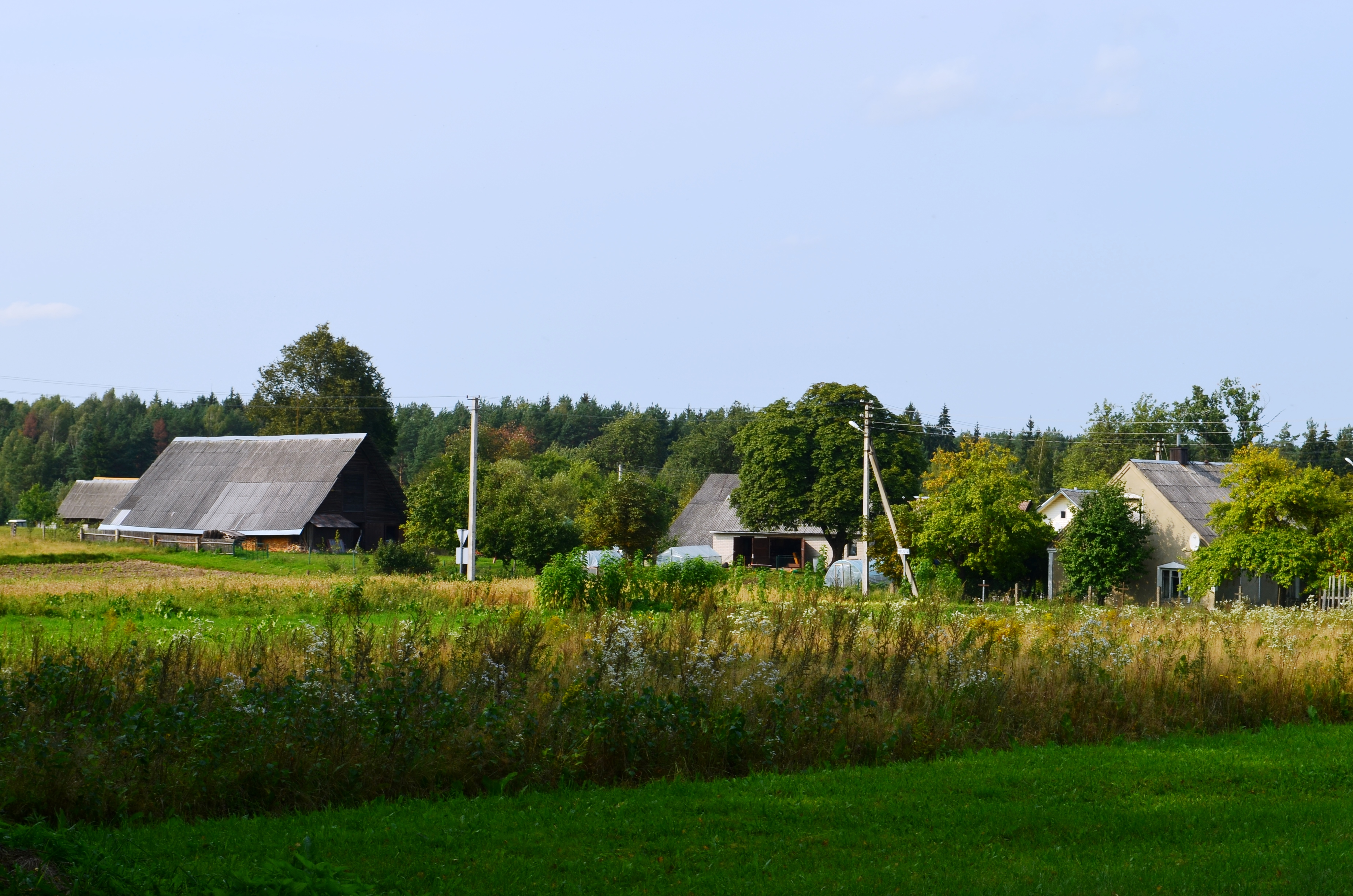 Uosininkai I, Mickūnų sen., Vilniaus raj.